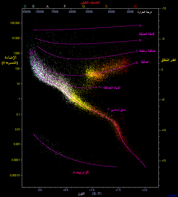 رسم هرسل، أو هرتزشبرونغ-راسل، موضحًا النسق الأساسي للنجوم المحور الأعلى يوضح التصنيف الطيفي المحور الأسفل يوضح اللون المحور الأيمن يوضح القدر المطلق المحور الأيسر يوضح السطوع مقارنة بالشمس